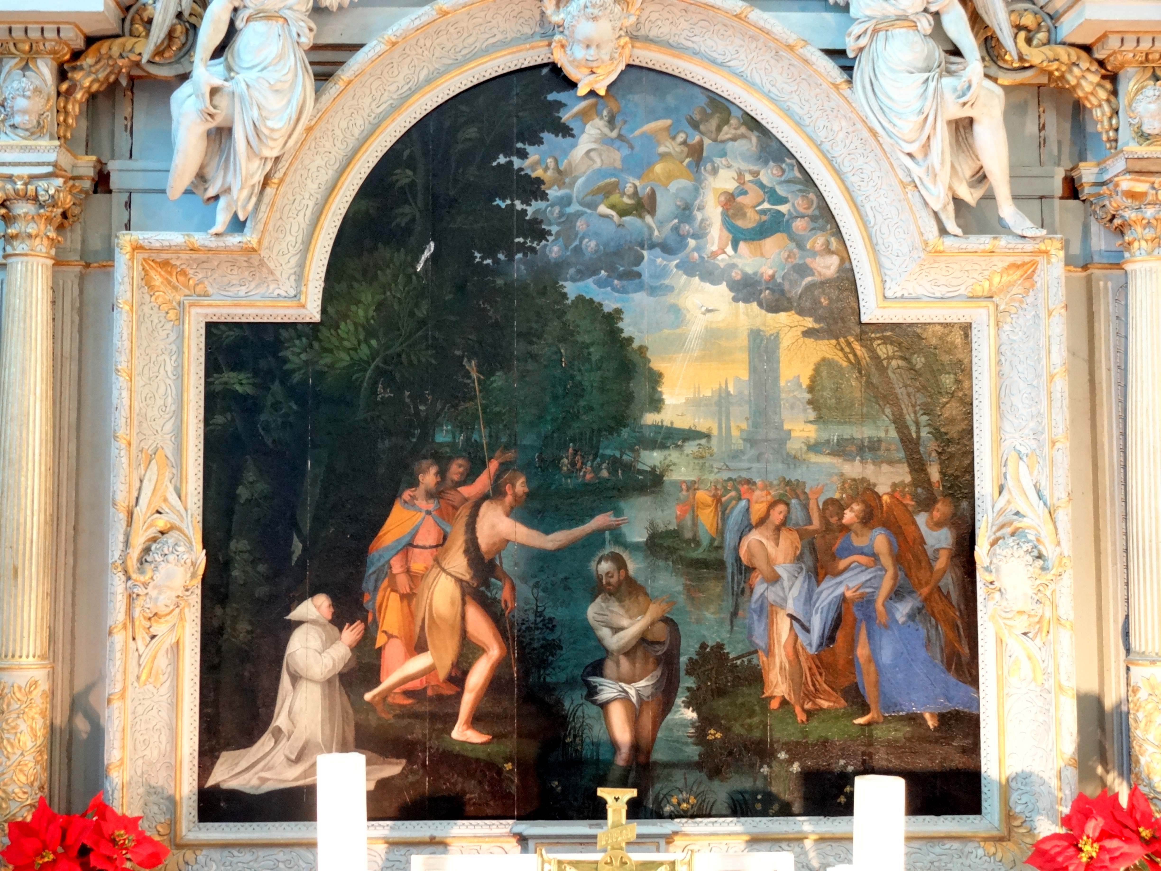 Retable latéral nord, tableau - baptême du Christ, par Henri Lerambert, vers 1591.